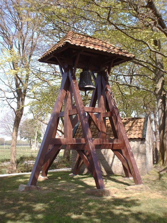 Klokkenstoel Langedijke